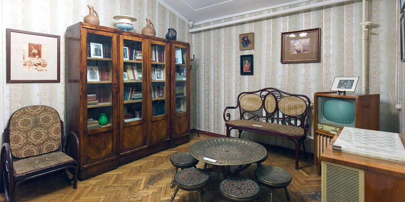 Экспозиция музея Налбандяна